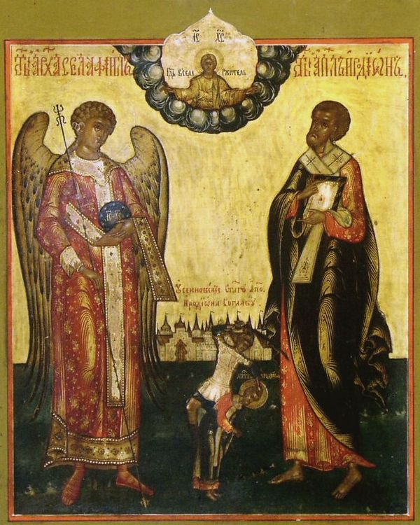 Архангел Селафиил и апостол Иродион Россия, 1840год, 31x27 см. Дерево, левкас, темпера Частное собрание, Германия